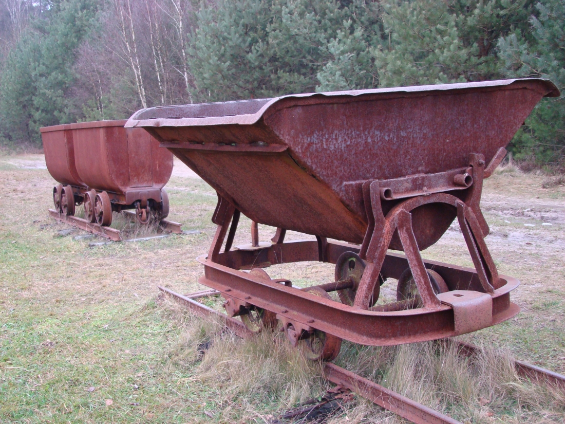 Original Kieselgur-Loren aus Neuohe